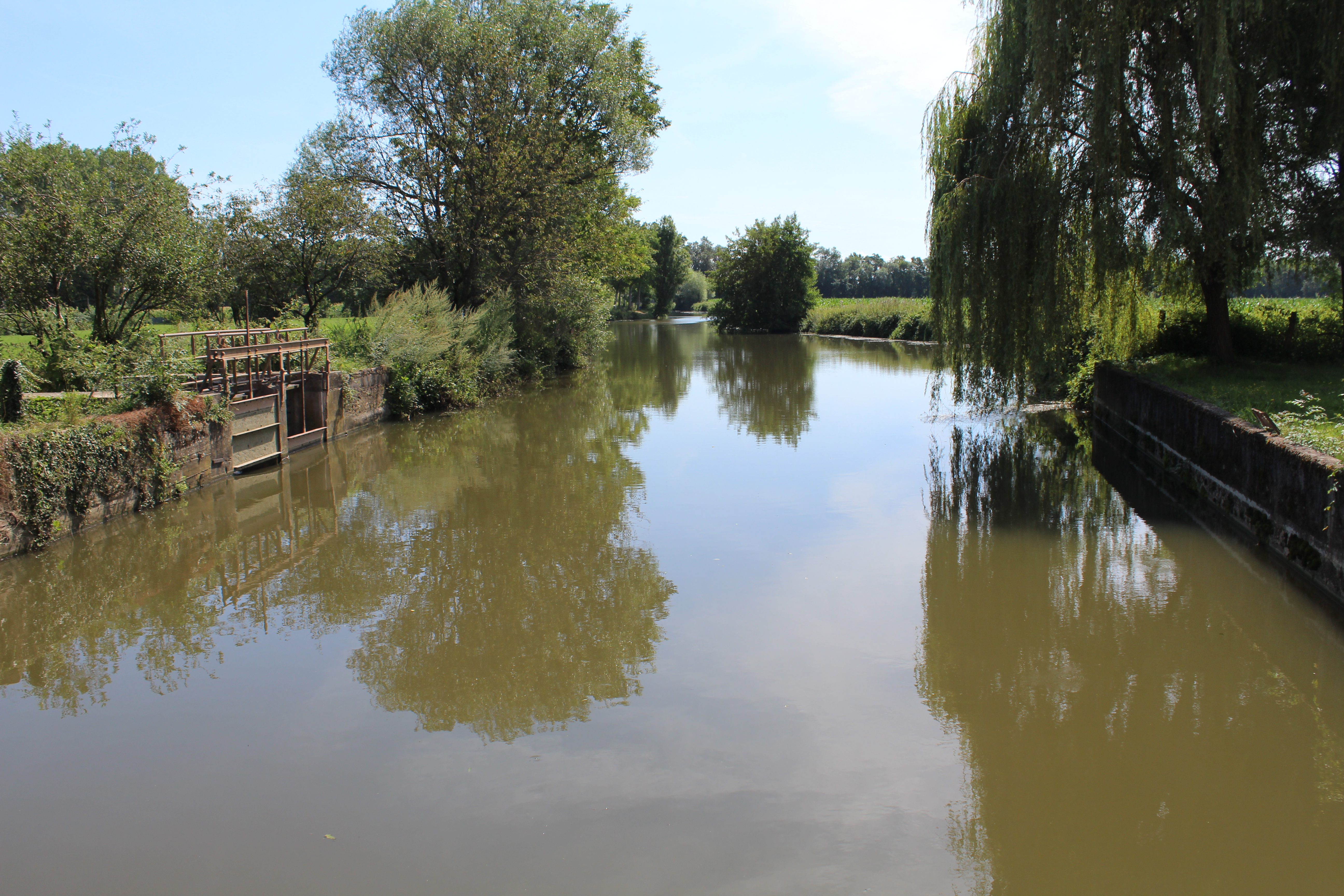 La Veyle entre Biziat et Vonnas en face du Moulin Péroux.